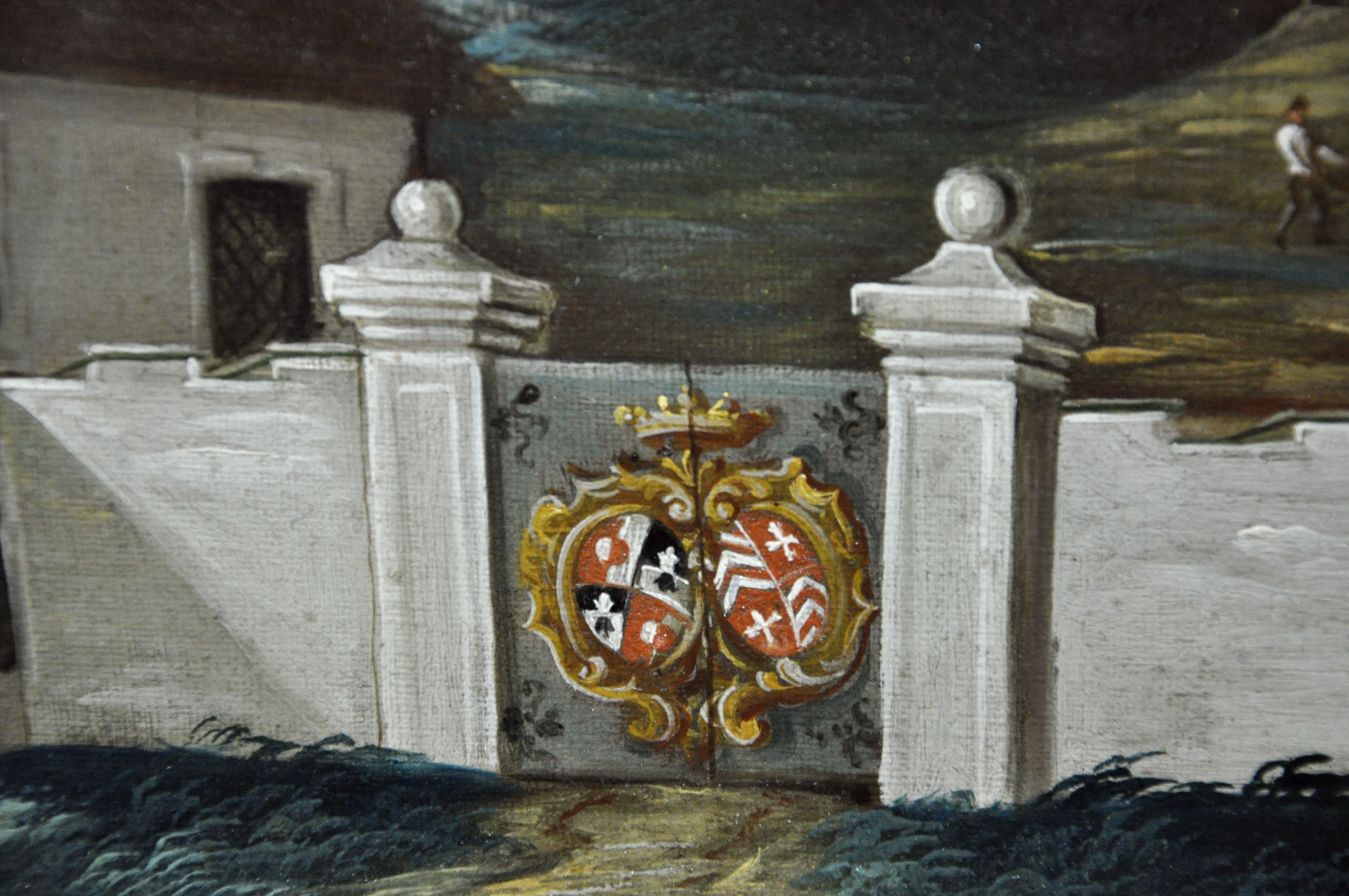 Allianzwappen Kuenburg/Rollingendetail